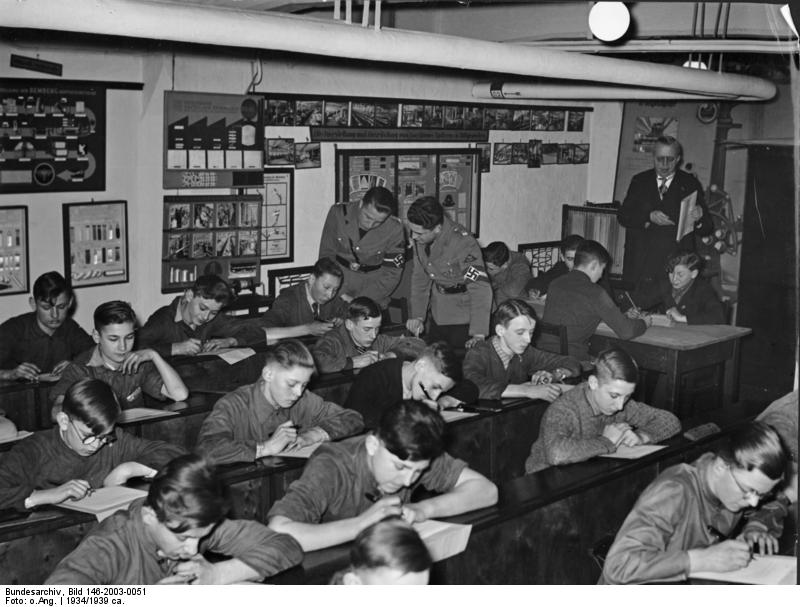 Bei emsiger Arbeit an den Lösungen der Aufgaben zum Reichs-Berufswettkampf, in den Lehrräumen eines Textilwerkes.